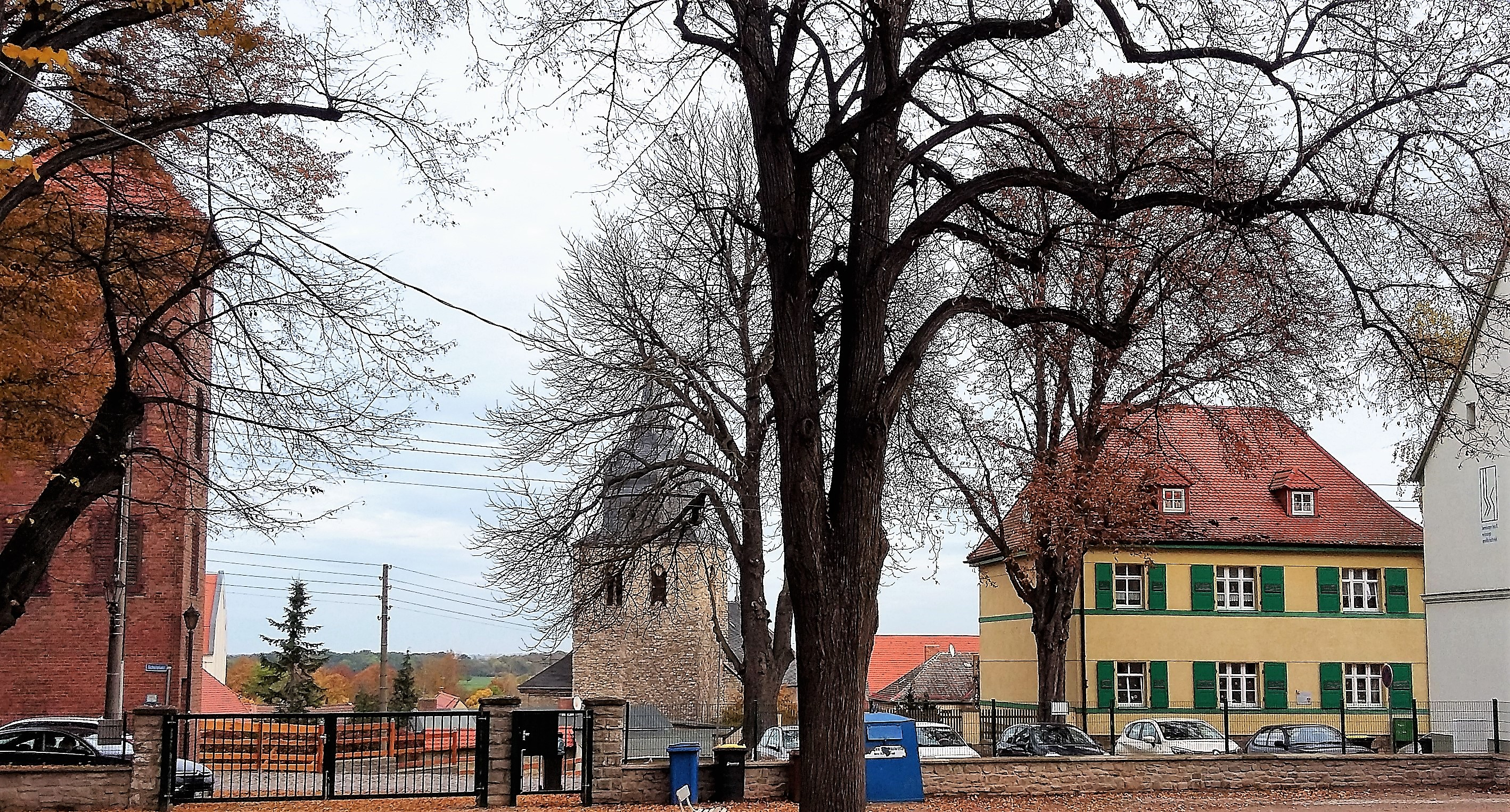 Ärztehaus, Stadtkirche, Feuerwehrturm (v. re.) in Alsleben (Saale)